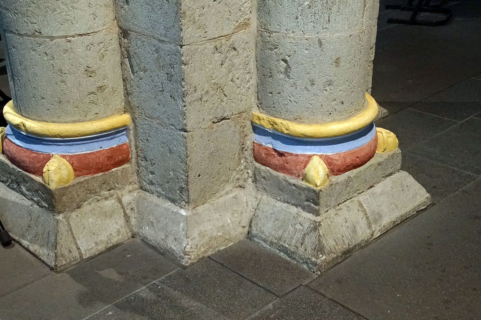 KNECHTSTEDEN